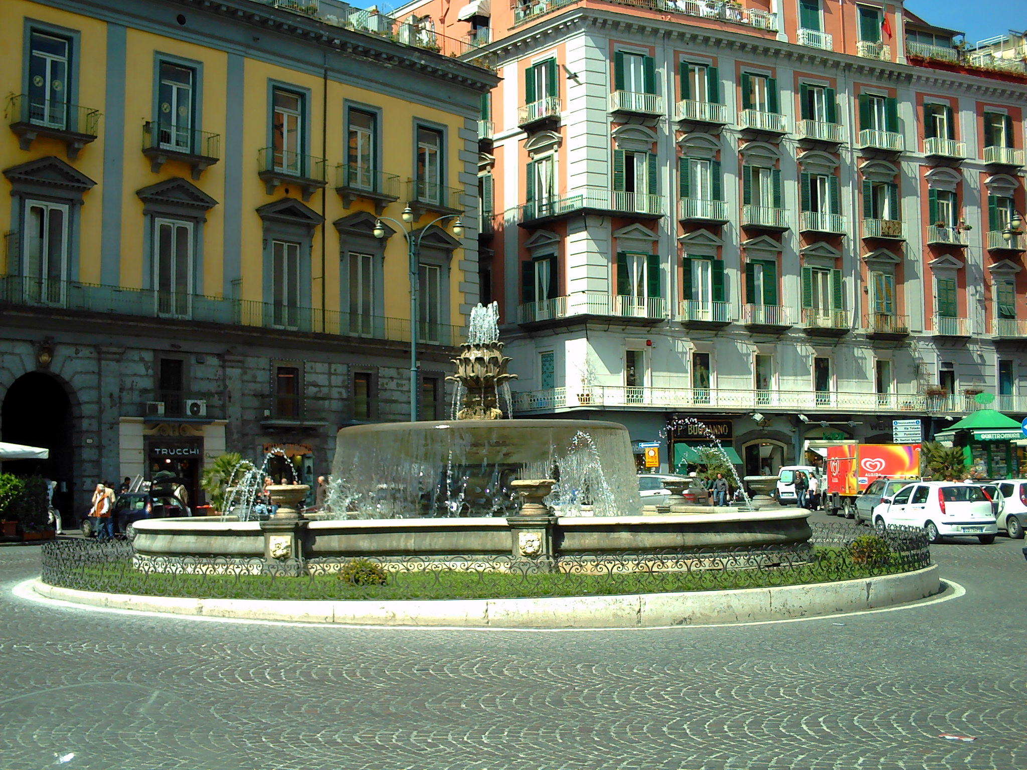 Fontana del Carciofo (Napoli)